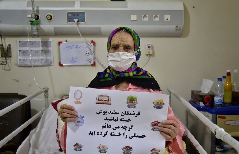 تحویل سال ۹۹ همراه سفیدپوشان خط مقدم مبارزه با کرونا